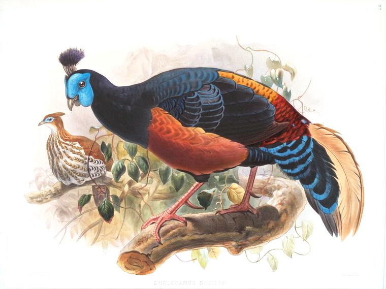 Euplocamus nobilis